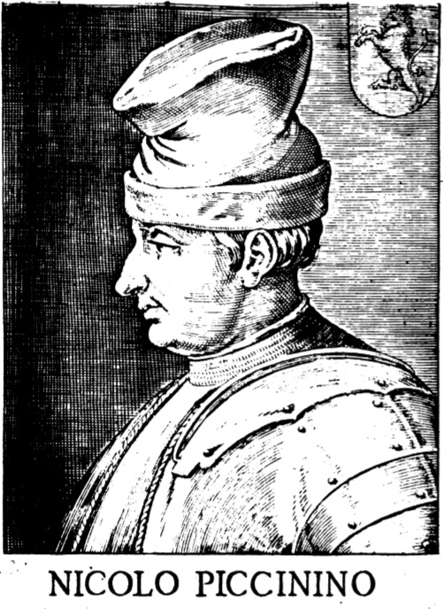 Ritratto del condottiero Niccolò Piccinino